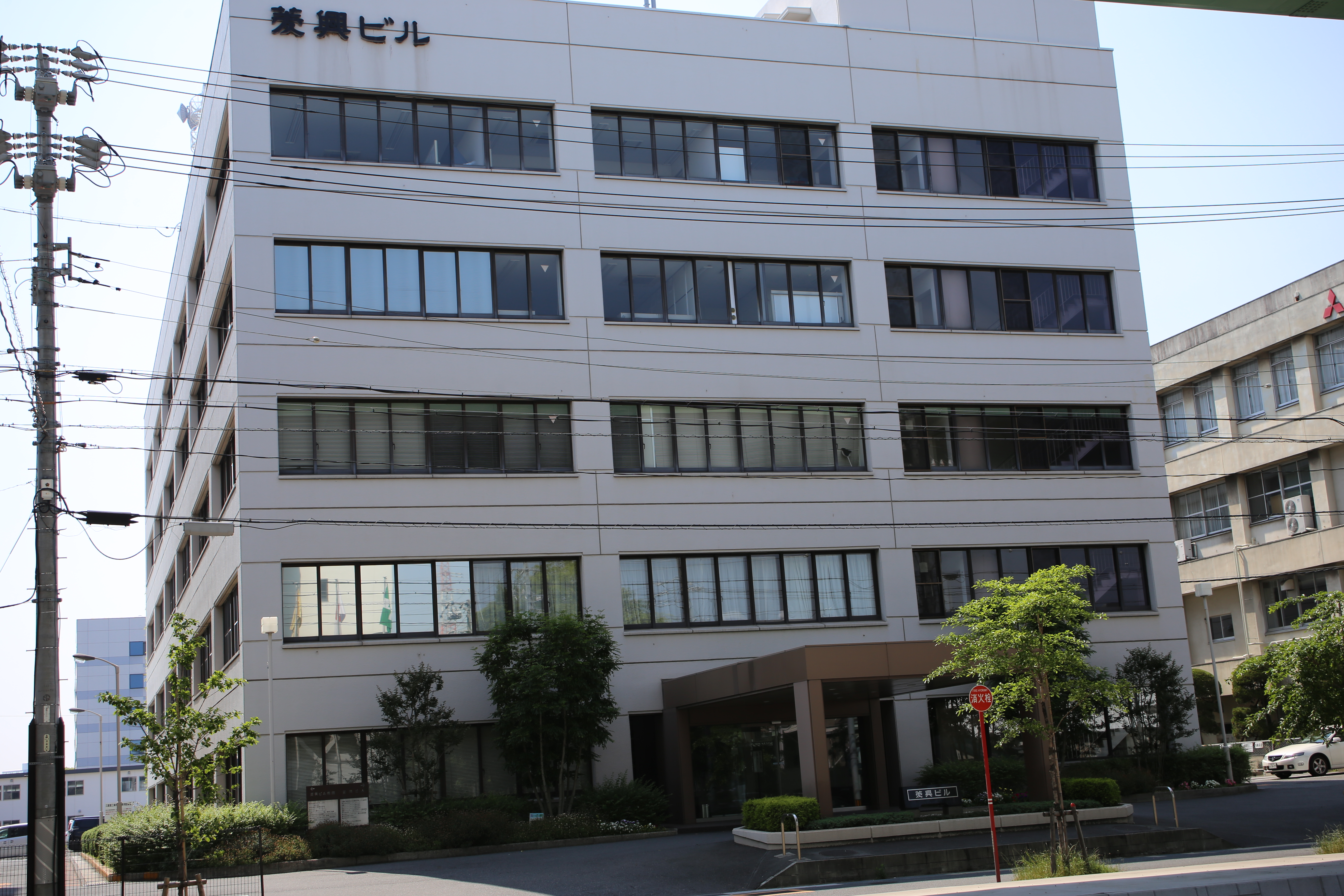 名古屋市港区大江町の菱興ビルを東側公道南側より撮影